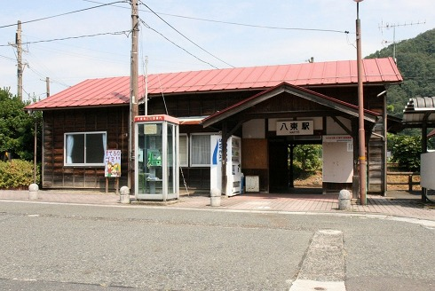 八東駅